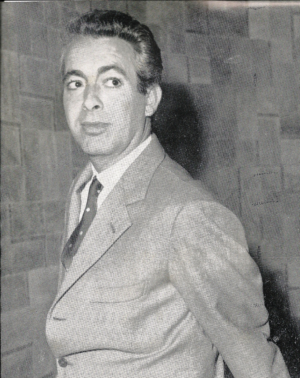 Tonino Pierfederici attore